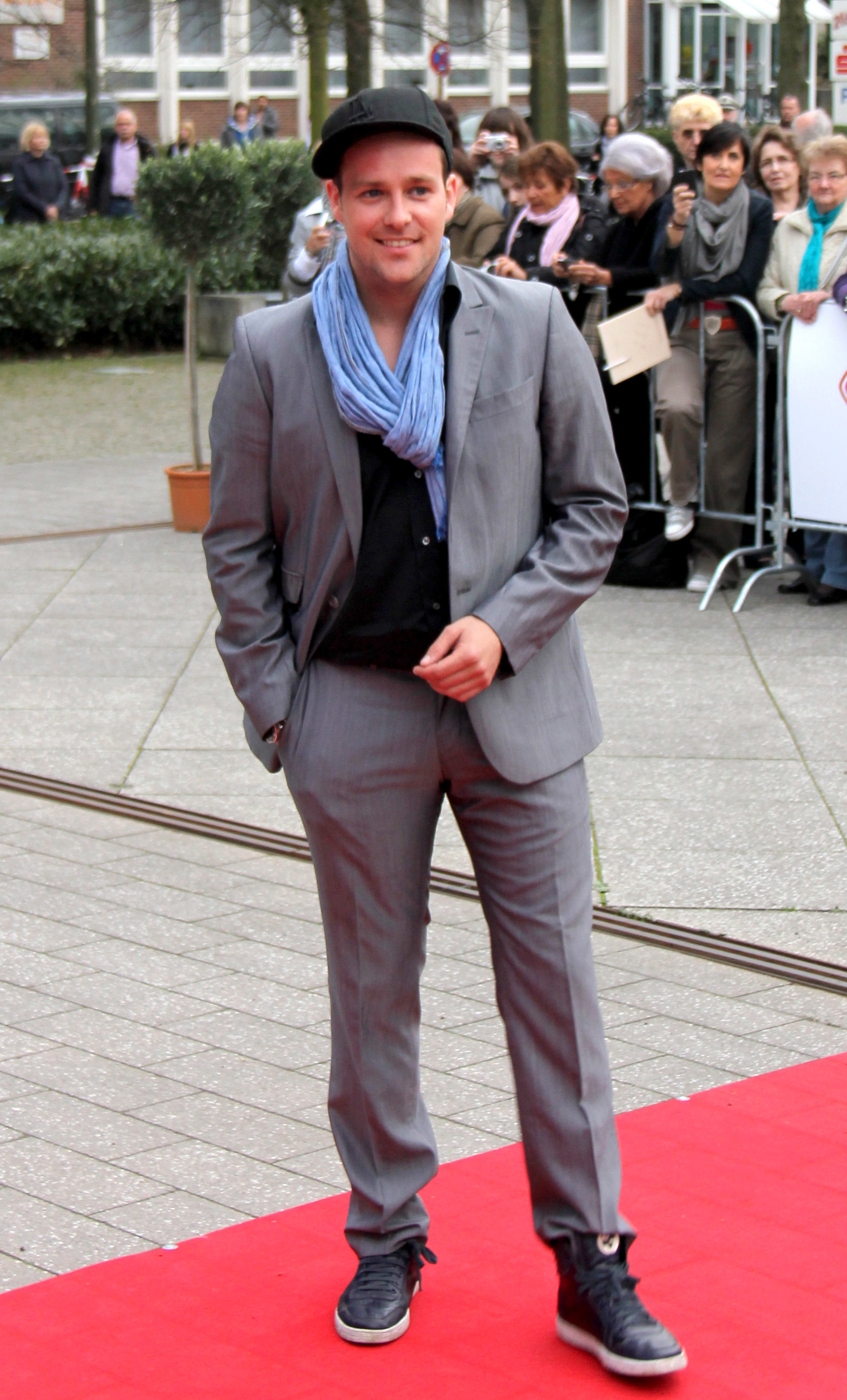 Ben bei der Grimme-Preis-Verleihung 2011